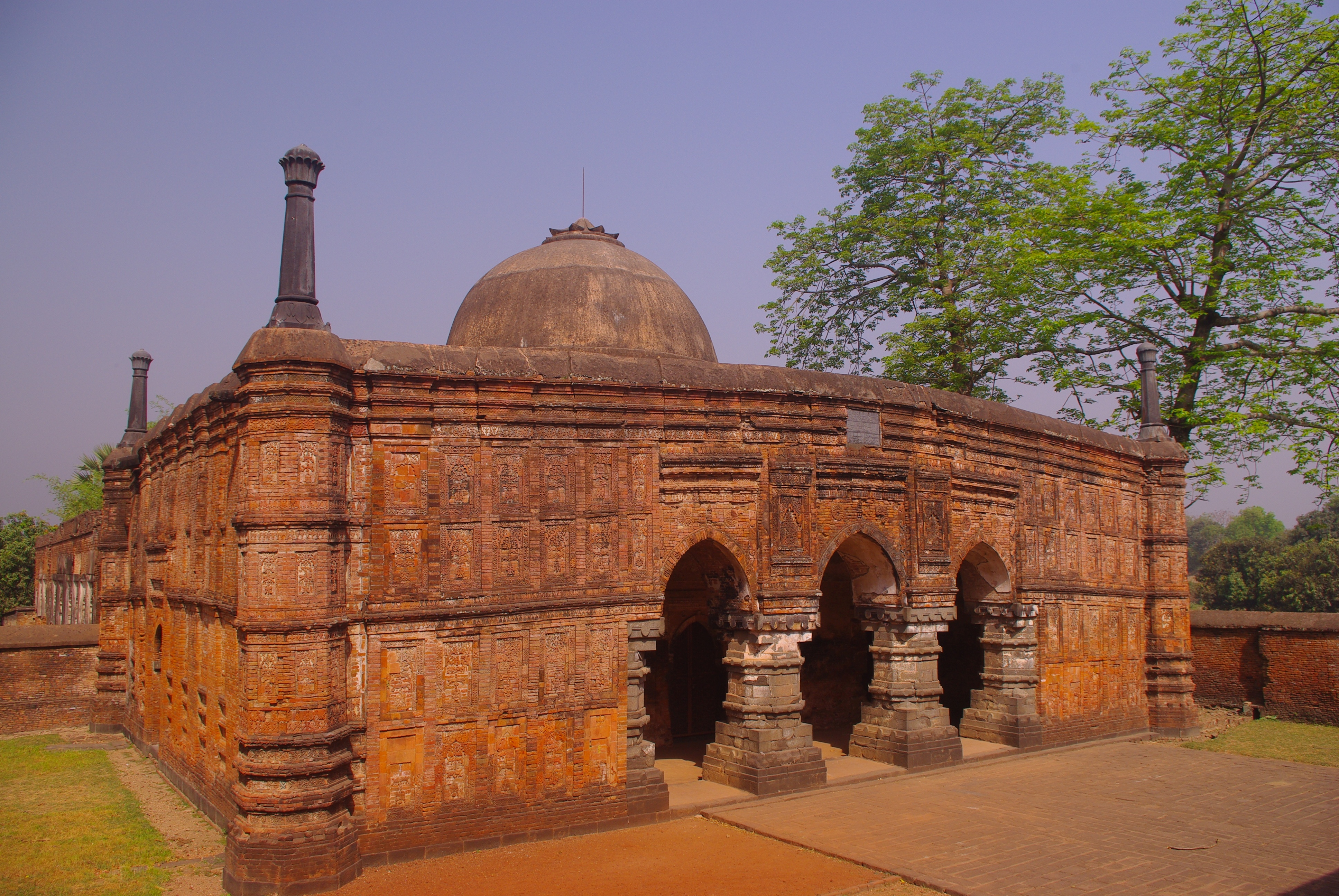 কদম রসুল মসজিদ